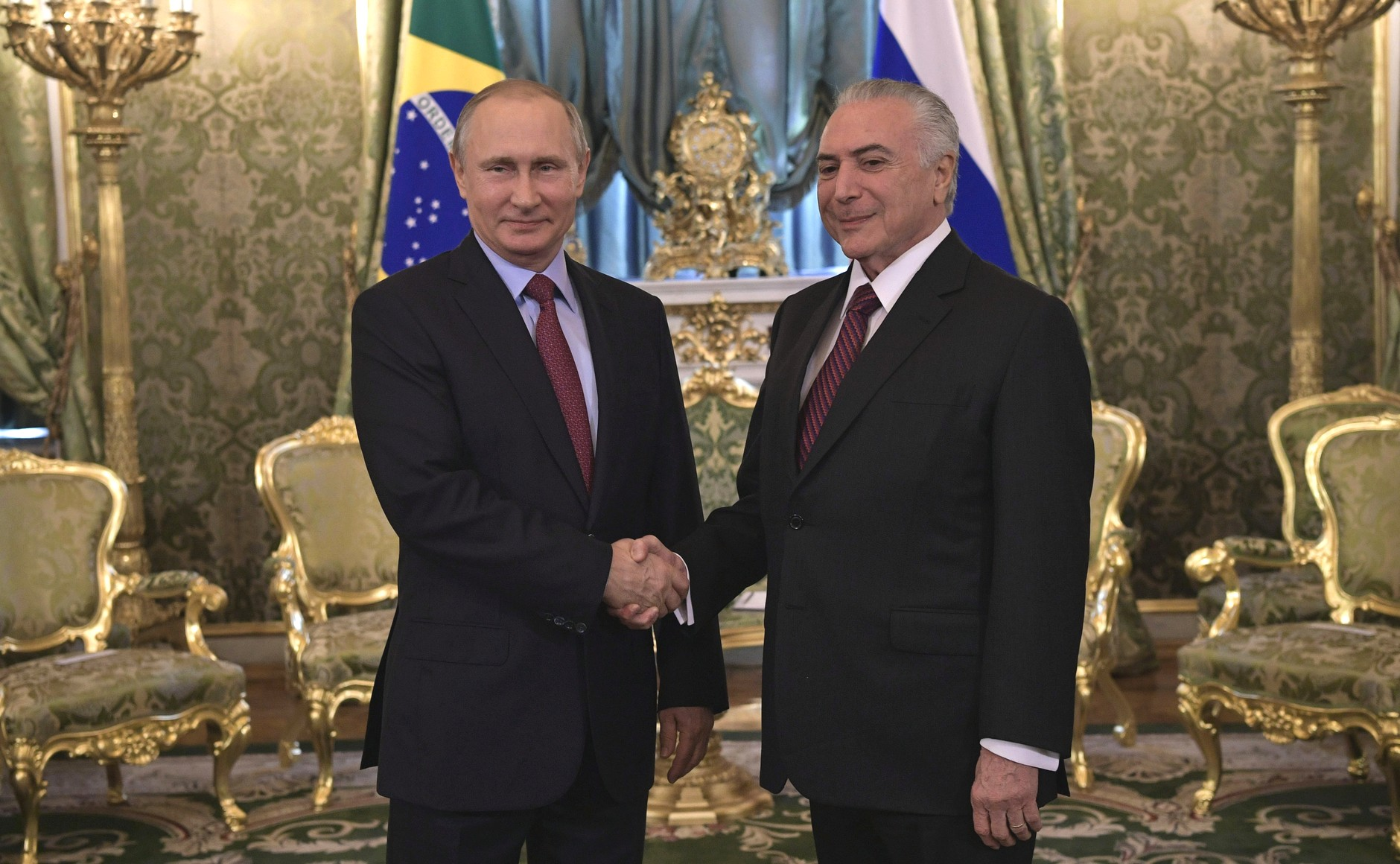 Президент России Владимир Путин с Президентом Бразилии Мишелом Темером